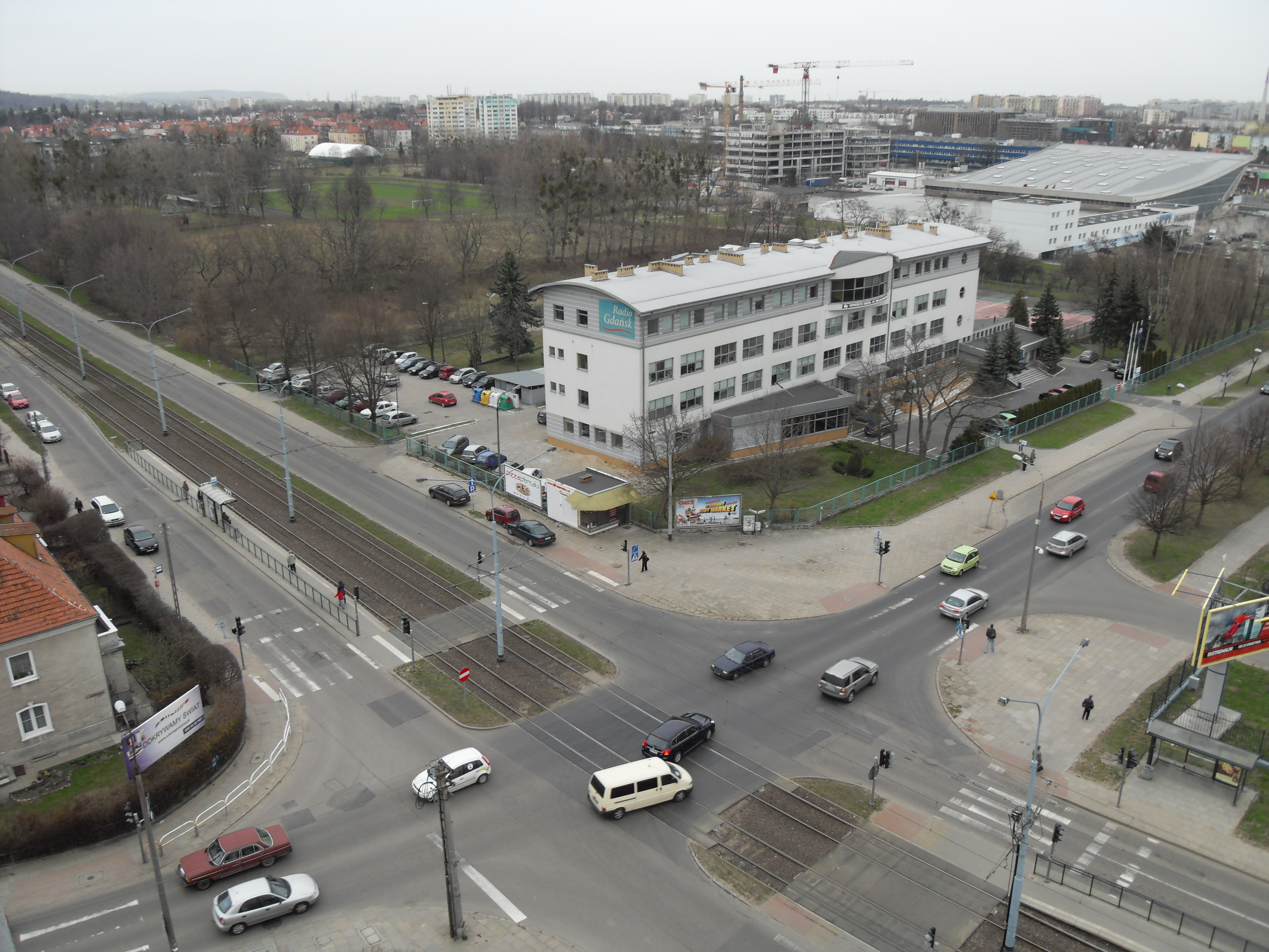 Gdańsk Oliwa - skrzyżowanie ul. Wita Stwosza z ul. Bażyńskiego.